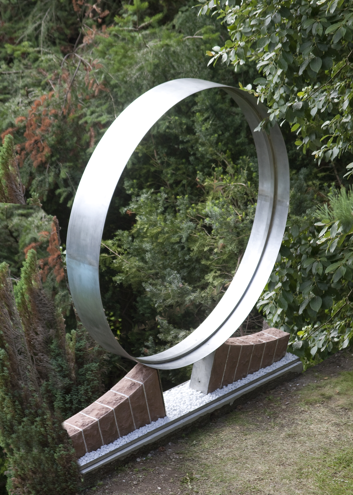 V2A-Stahlarbeit "Der Ring zum Richard-Wagner-Jahr" von Ada Mee